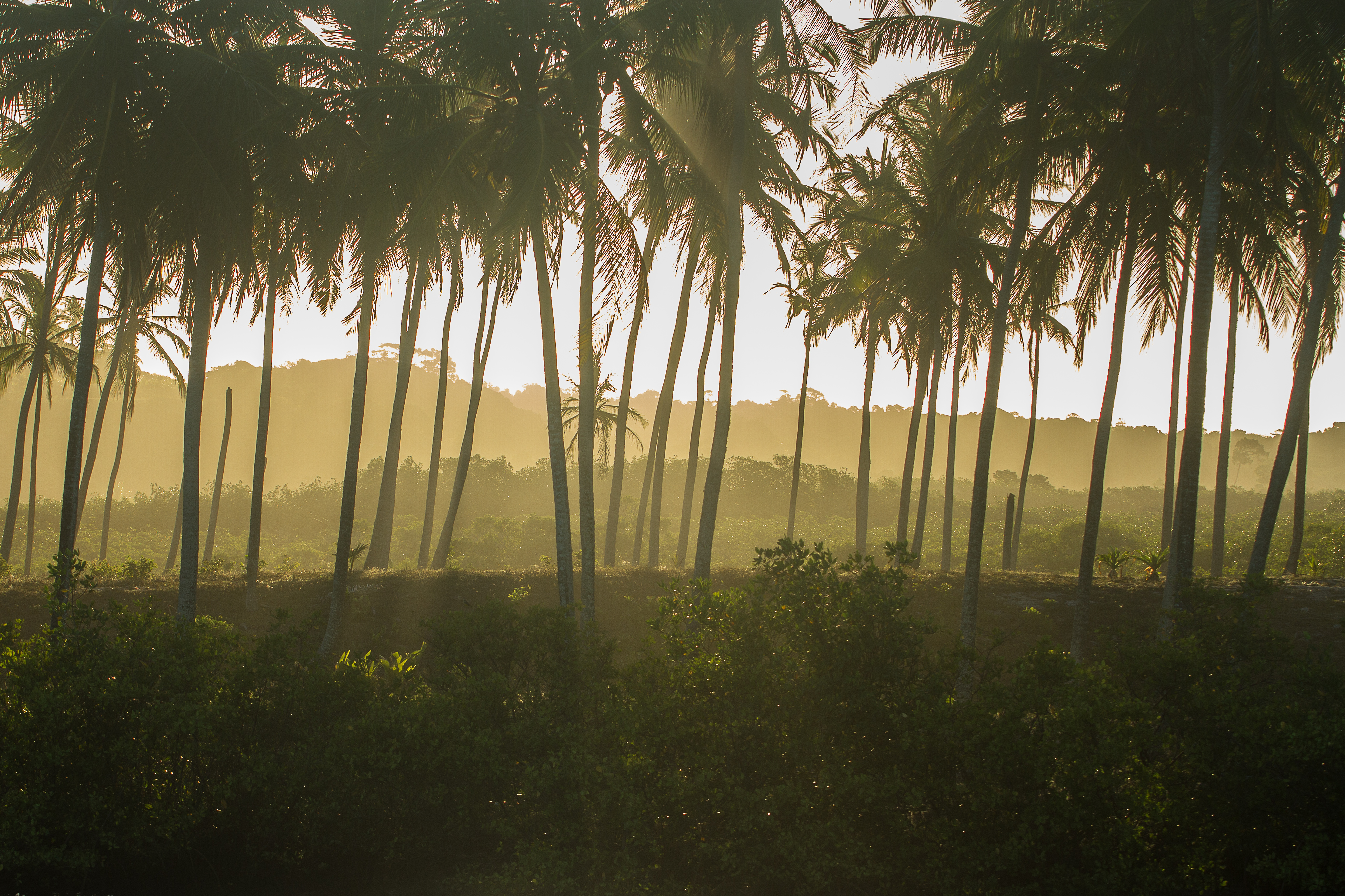 Entardecer no Refúgio de Vida Silvestre do Rio dos Frades. Coqueiral com vegetação de restinga ao fundo.